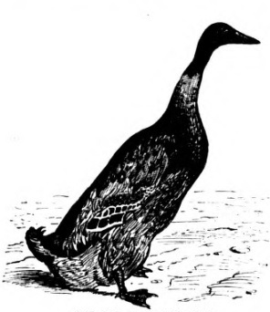 Abbildungen für Pinguinente Laufente Japanische Ente Pekingente (Rassegeflügel)